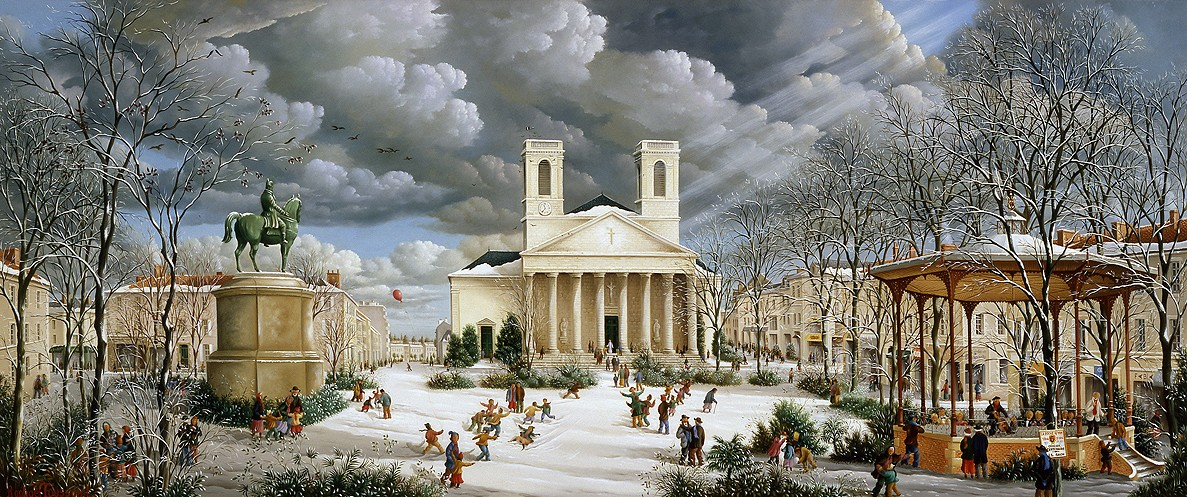 La Roche-sur-Yon - la place Napoléon par le peintre français Raphaël Toussaint.